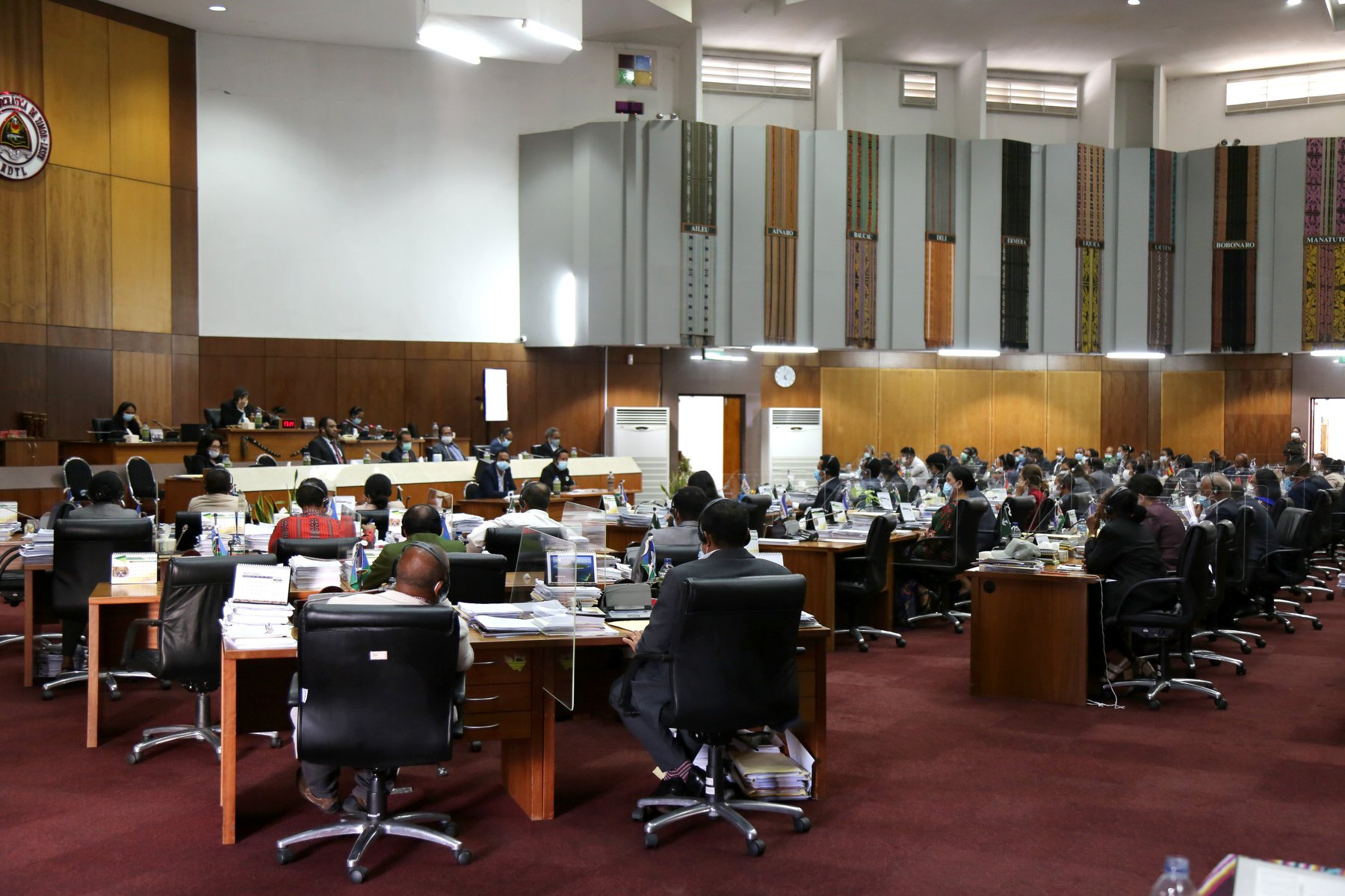 Sitzung zur Verlängerung des Ausnahmezustandes im Nationalparlament Osttimors